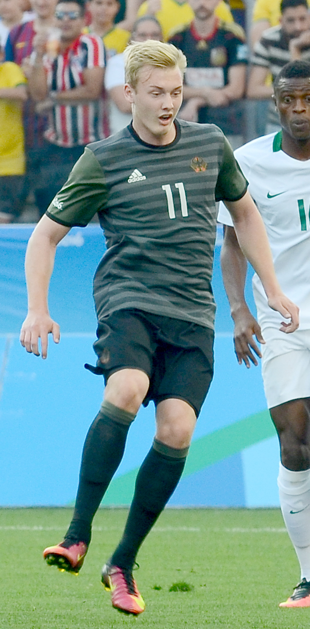 São Paulo - Alemanha vence a Nigéria por 2 a 0 e se classifica para a final na Arena Corinthians (Rovena Rosa/Agência Brasil)